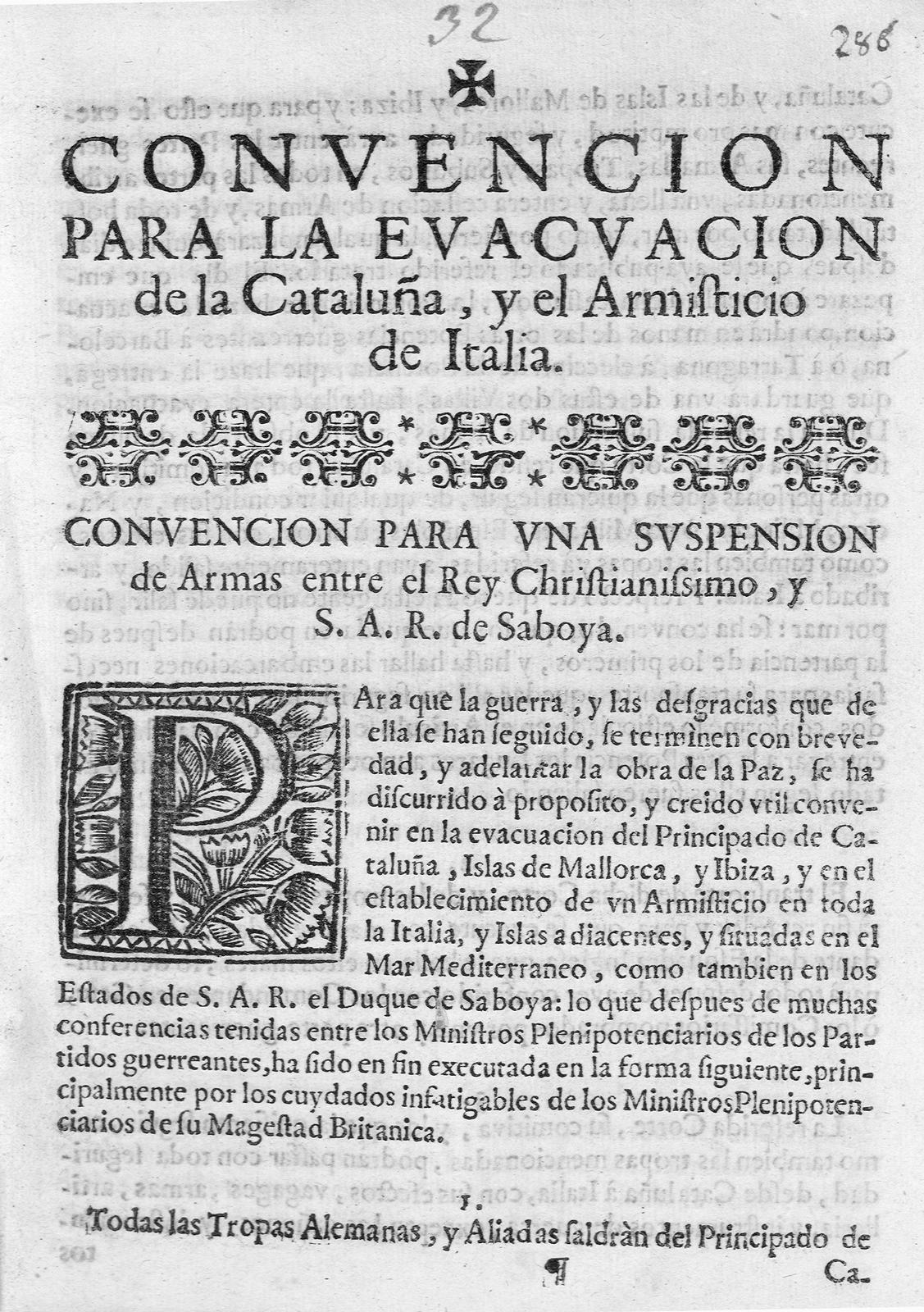 Convencion para la evacuacion de la Cataluña y el armisticio de Italia publicado en Sevilla en 1713